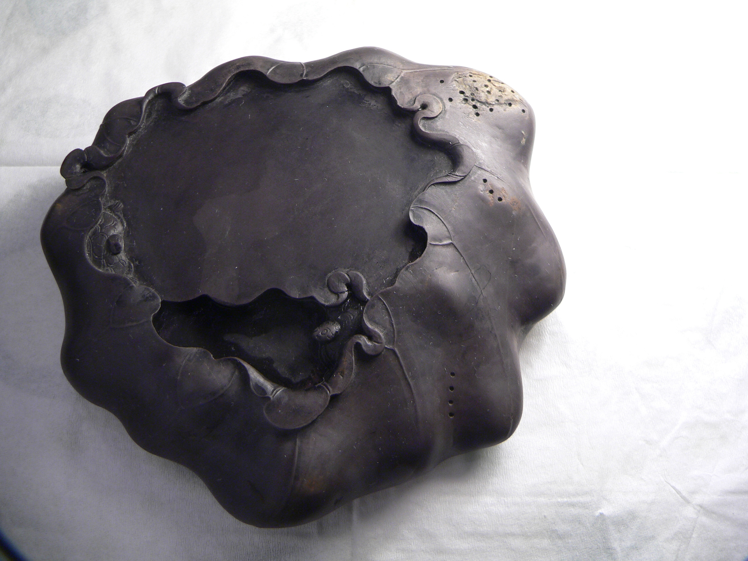 端砚/duan inkstone